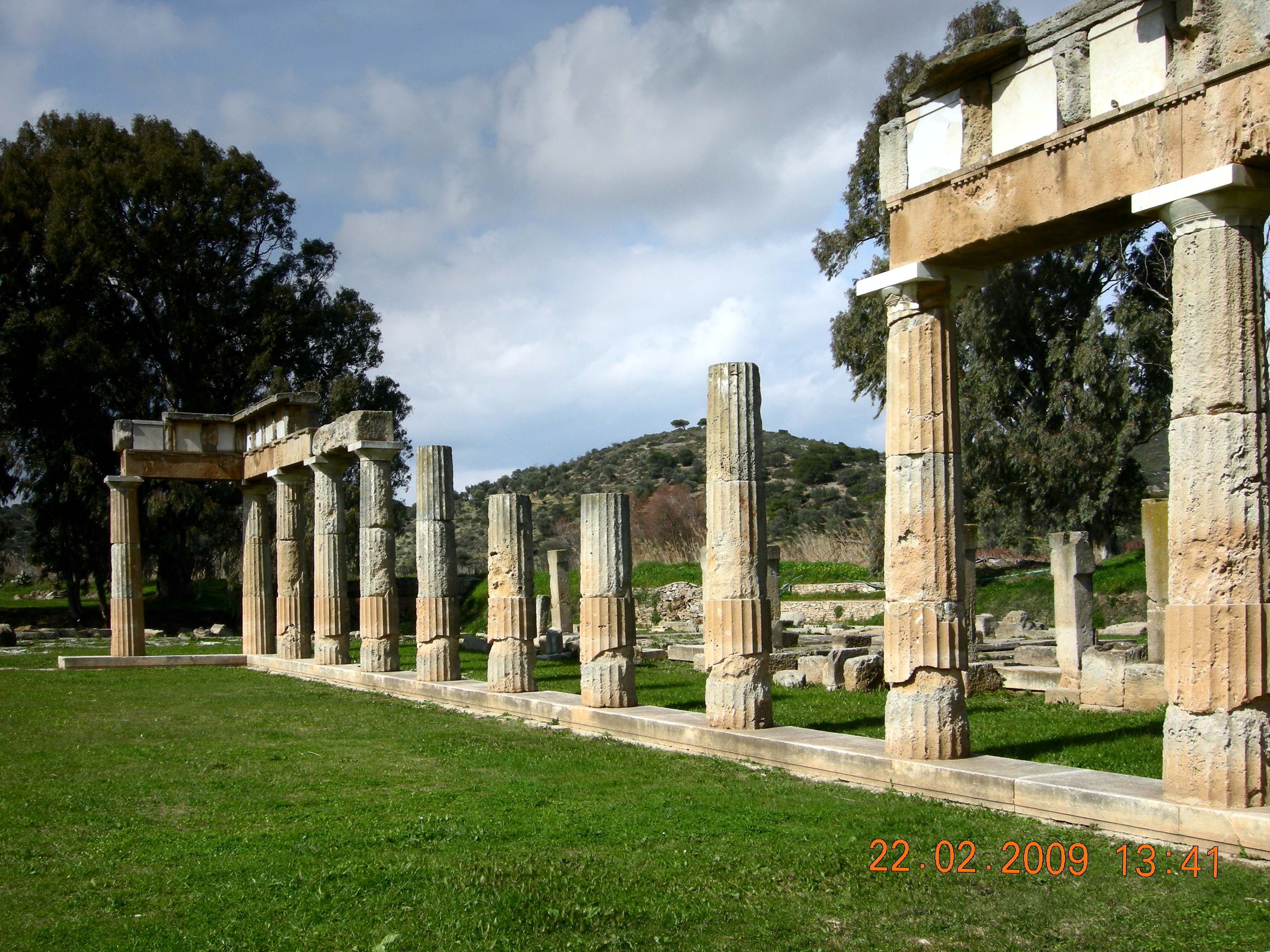 Βραυρώνα, Το διατηρημένο τμήμα της στοάς«Βραυρώνα»